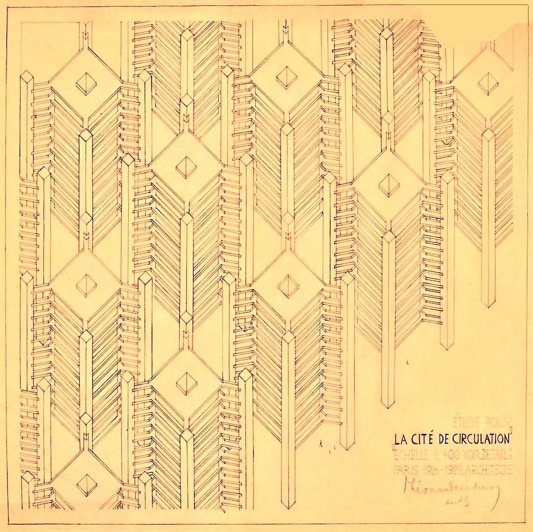 Theo van Doesburg, Cité de circulation, 1923-1929 (image Commons modifiée)